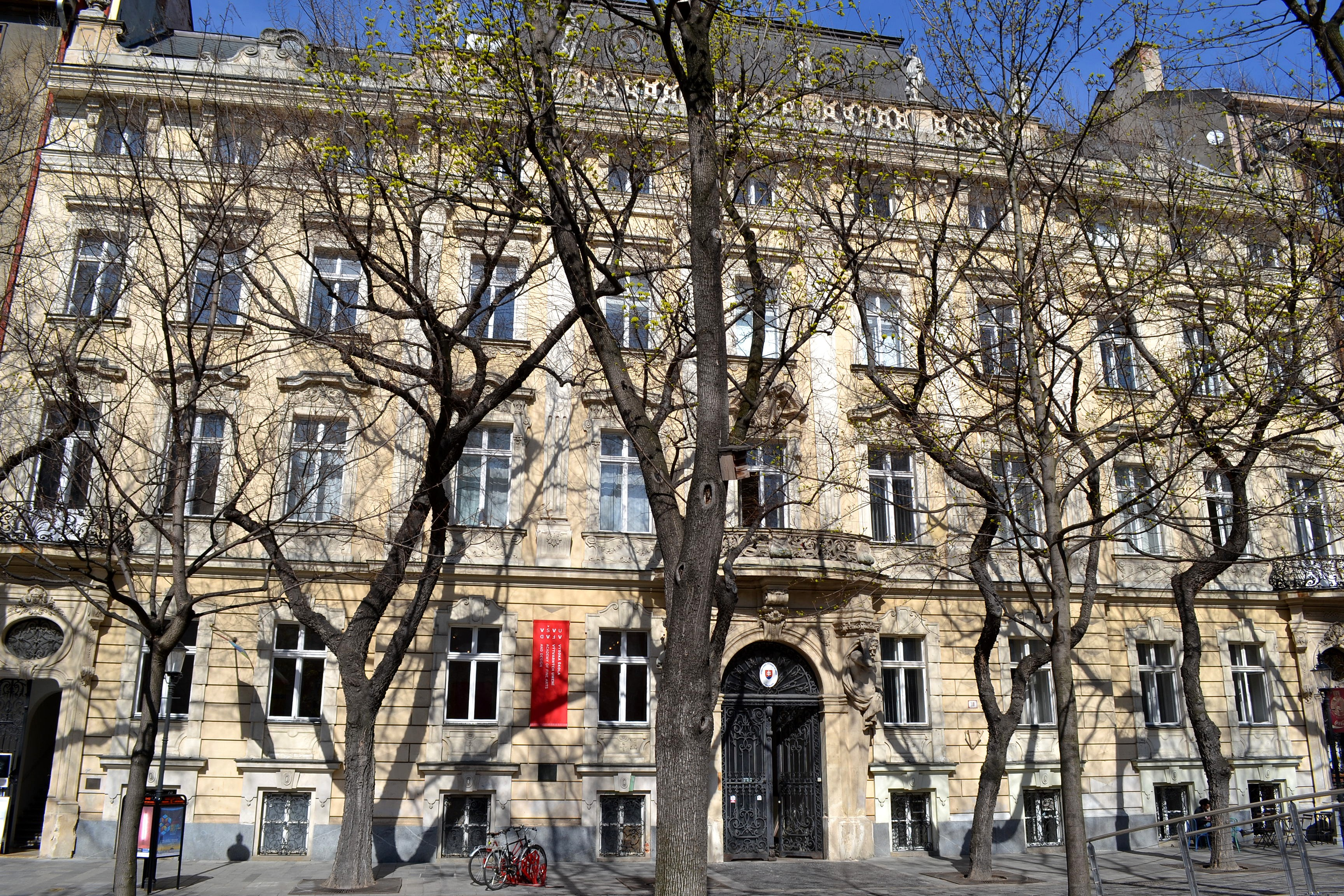 Hviezdoslavovo nám. č. 18. Palác si dal v druhej pol. 19. storočia postaviť gróf Ján Pálffy. Stavbu podľa projektu známeho architekta Viktora Rumpelmayera postavili na mieste, kde stávalo mestské opevnenie. Dnes v paláci dnes sídli rektorát VŠVU